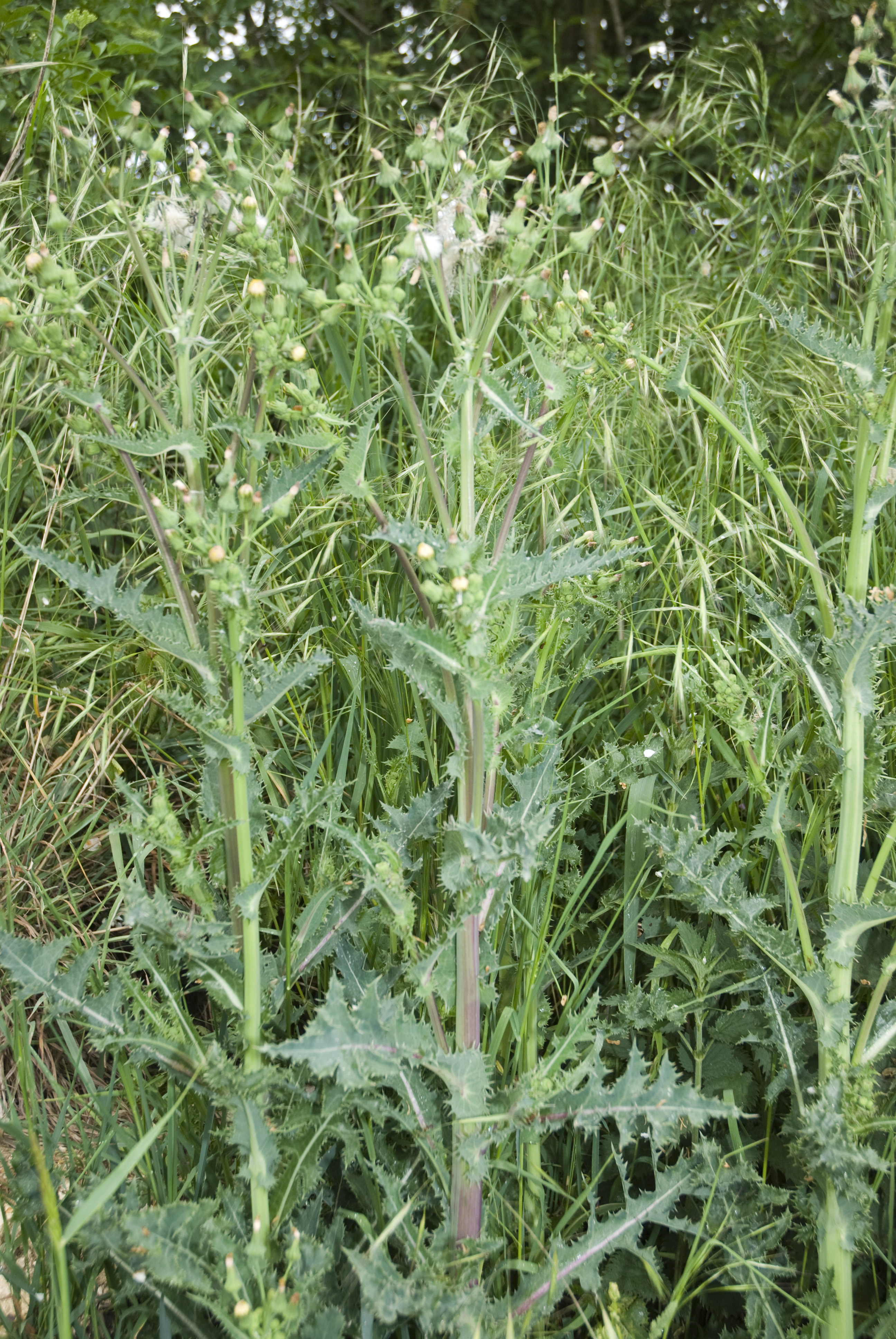 Sonchus asper Fluy (Somme), France